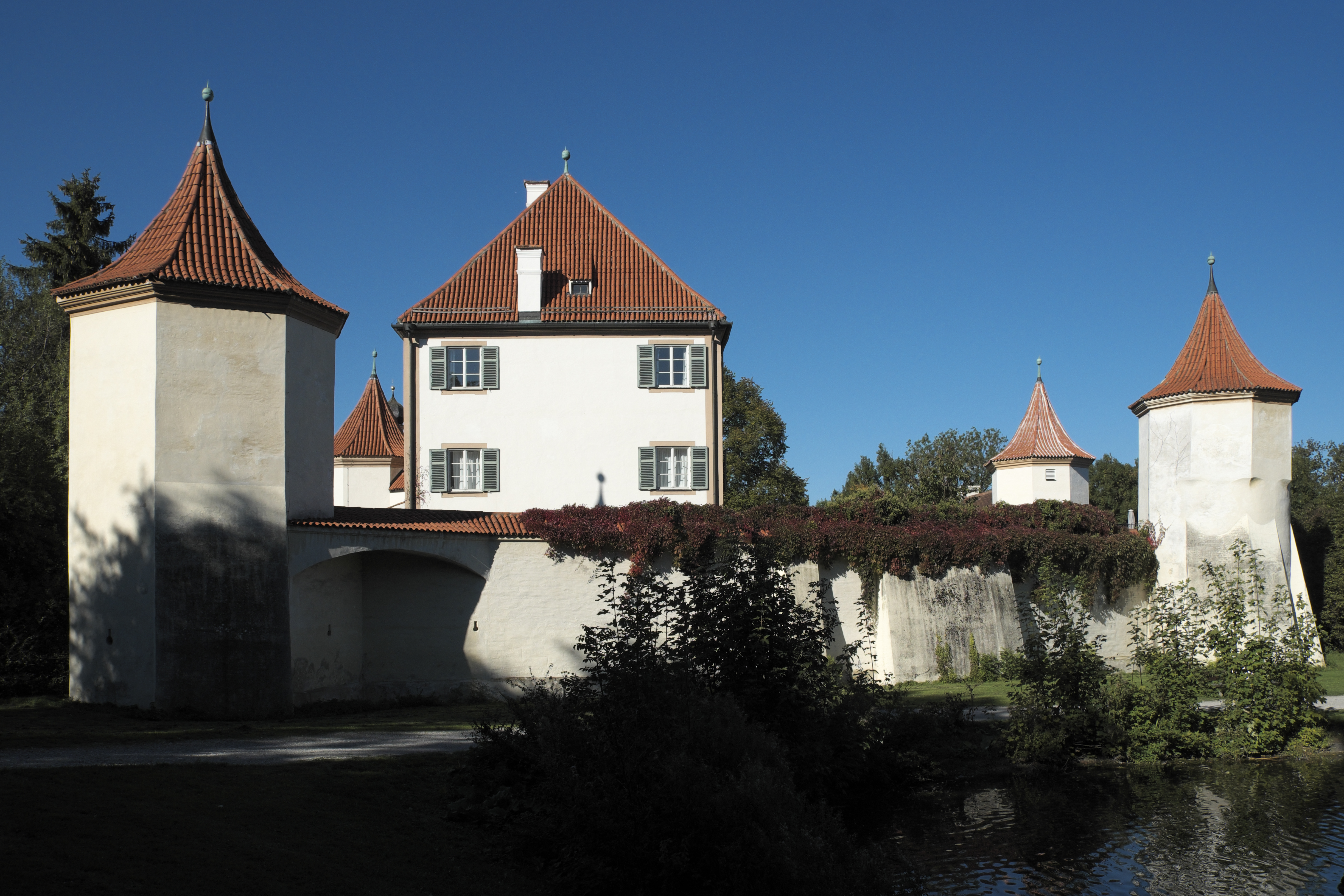 Schloss Blutenburg in Obermenzing im Stadtbezirk Pasing-Obermenzing in München (Bayern/Deutschland)